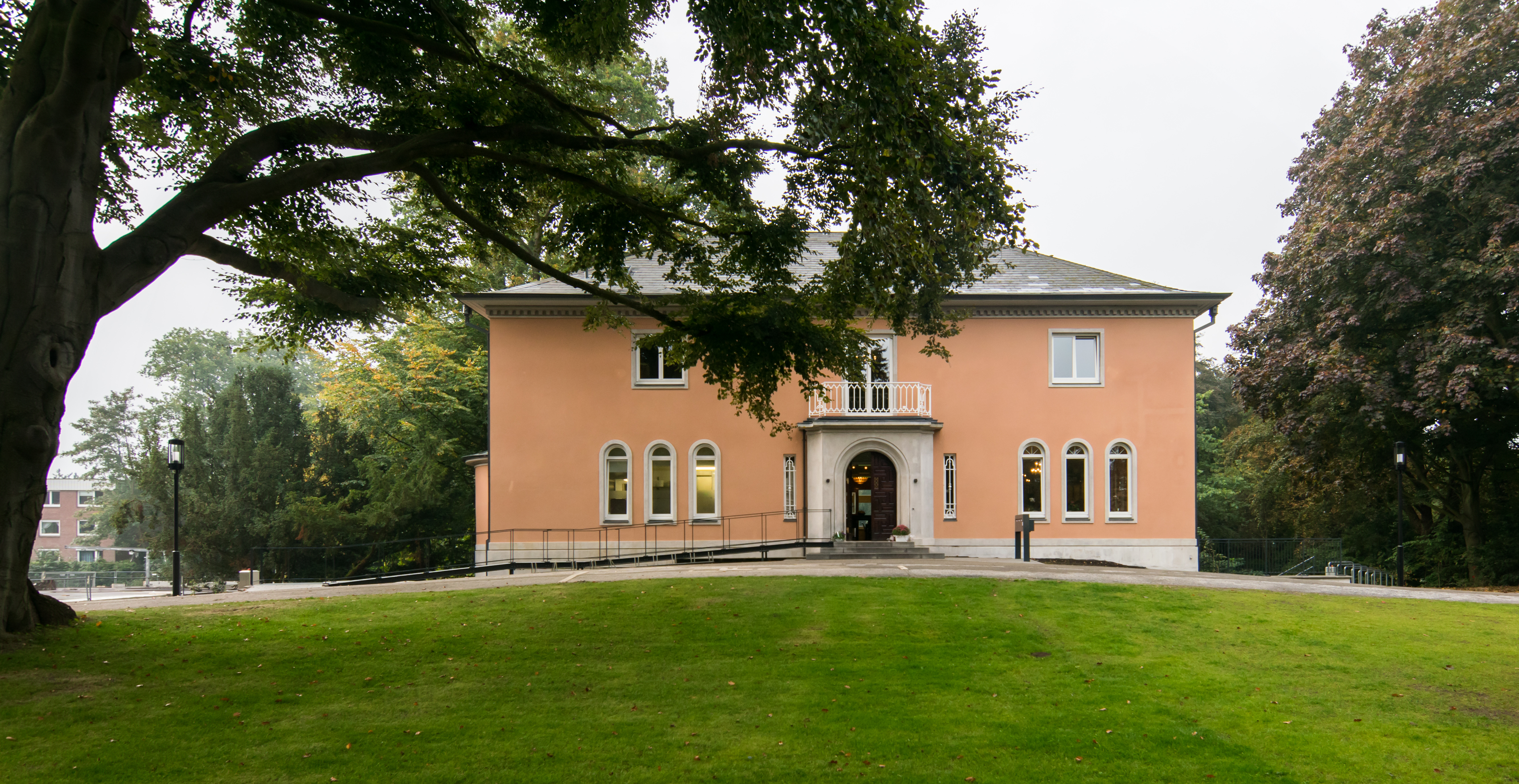 HH-Volksdorf Ohlendorffsche Villa